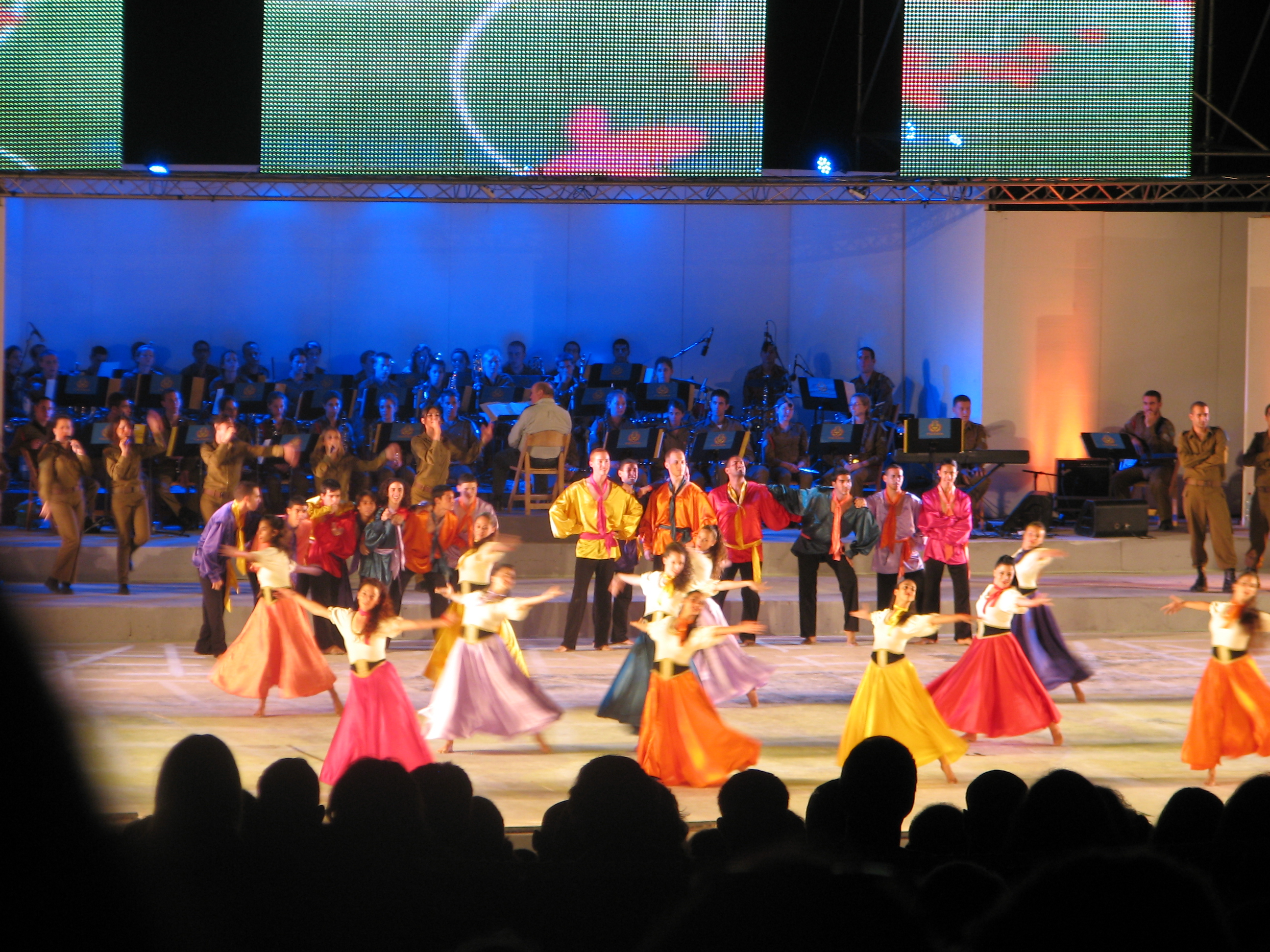 Karmiel Dance Festival, Is an annual dance festival held every summer in the city of Karmiel. The festival was founded in 1987 by two of the greatest authors of folk dance in Israel, Yonatan Carmon and want Hodes. July 2011 Festival פסטיבל מחול כרמיאל הוא פסטיבל מחול שנתי המתקיים בעיר כרמיאל מדי קיץ. הפסטיבל נוסד בשנת 1987 על ידי שניים מגדולי מחברי ריקודי העם בארץ, יונתן כרמון ותרצה הודס. אורכו של פסטיבל המחולות הוא שלושה ימים, ובמהלכו גודשים את העיר המוני אנשים, הצופים במגוון רב של הופעות רקדנים מהארץ ומחו"ל. צילומים מפסטיבל יולי 2011